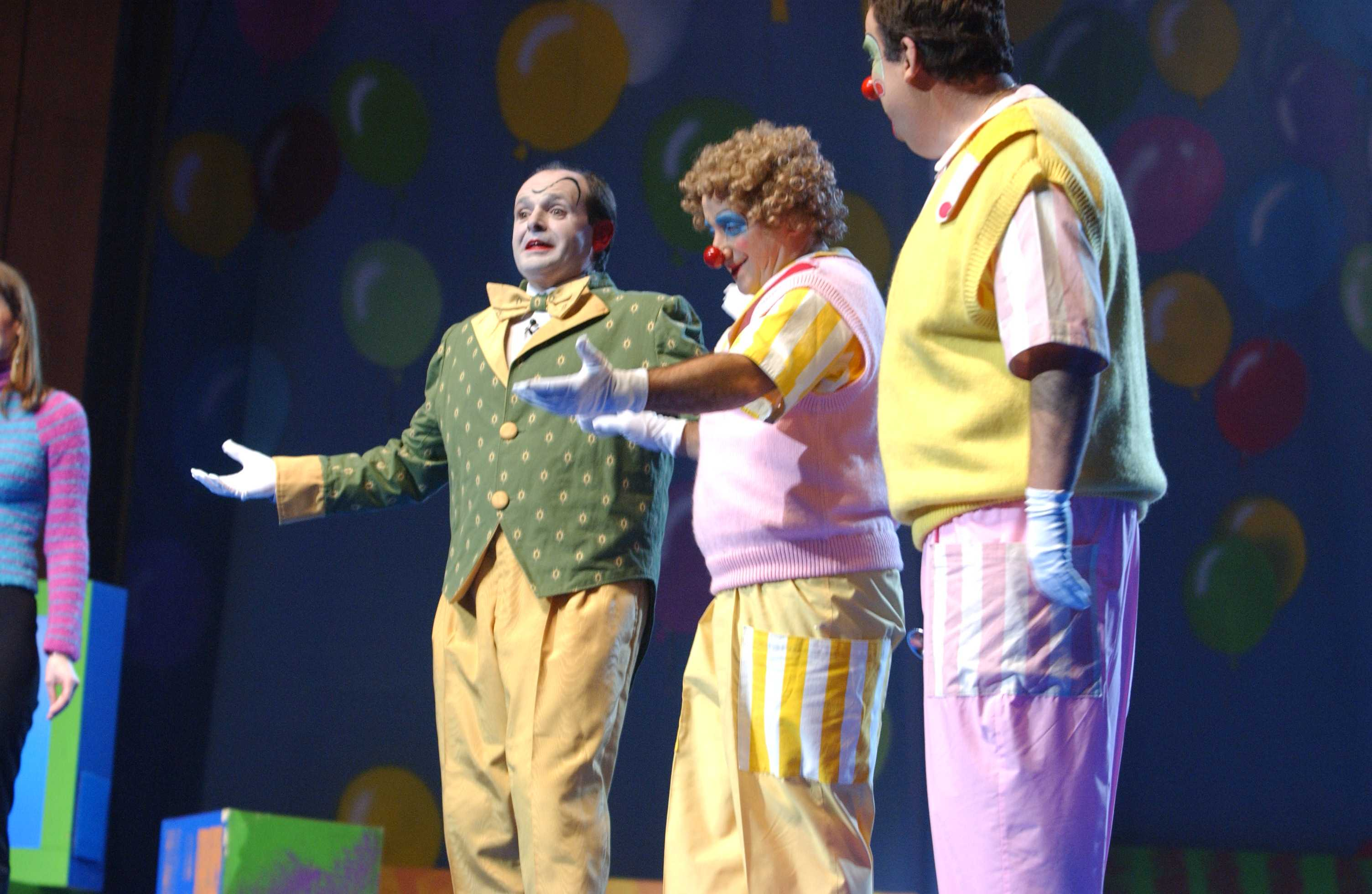 'Altza Porru' 2002. Euskal Telebista